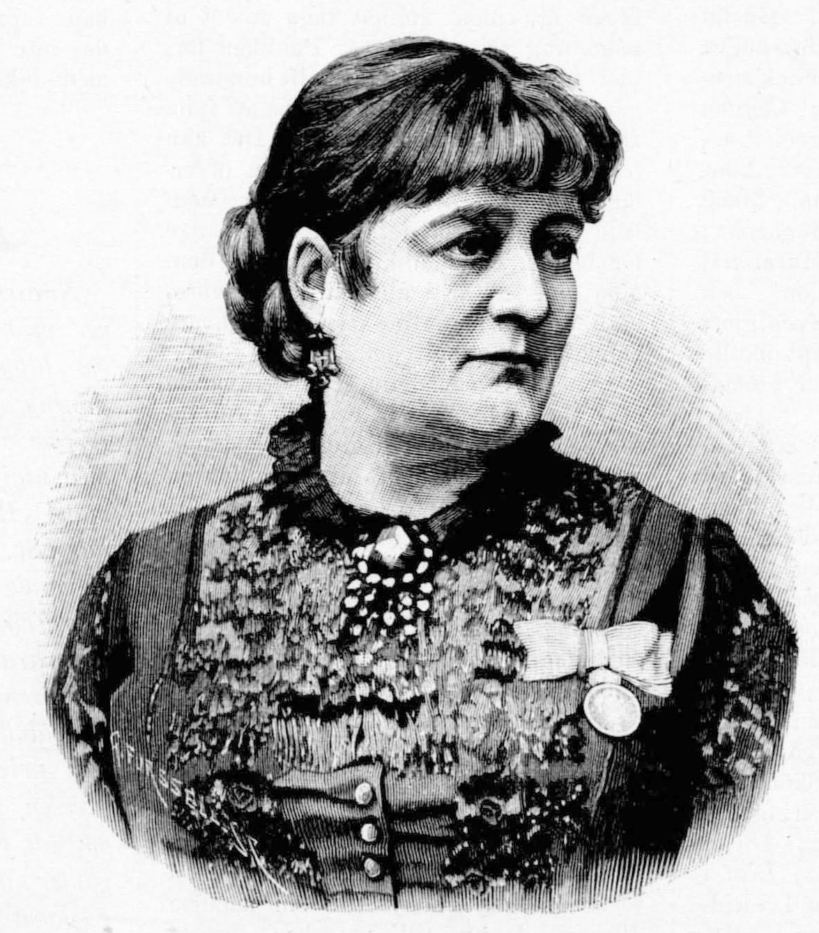 Charlotte Strandberg (1830-1913)